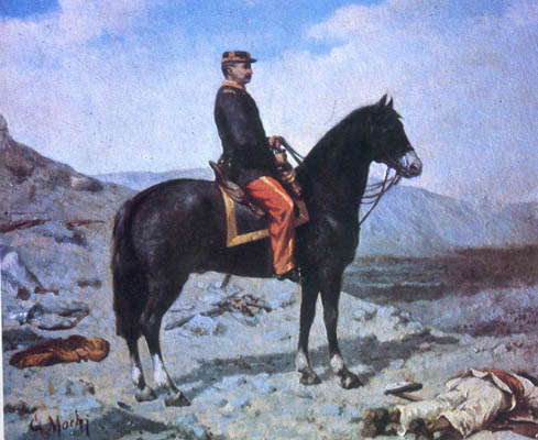 Manuel Jesús Baquedano González (Santiago, 1 de enero de 1823 - 30 de septiembre de 1897) fue un militar y presidente chileno, comandante en jefe del Ejército durante la Guerra del Pacífico.